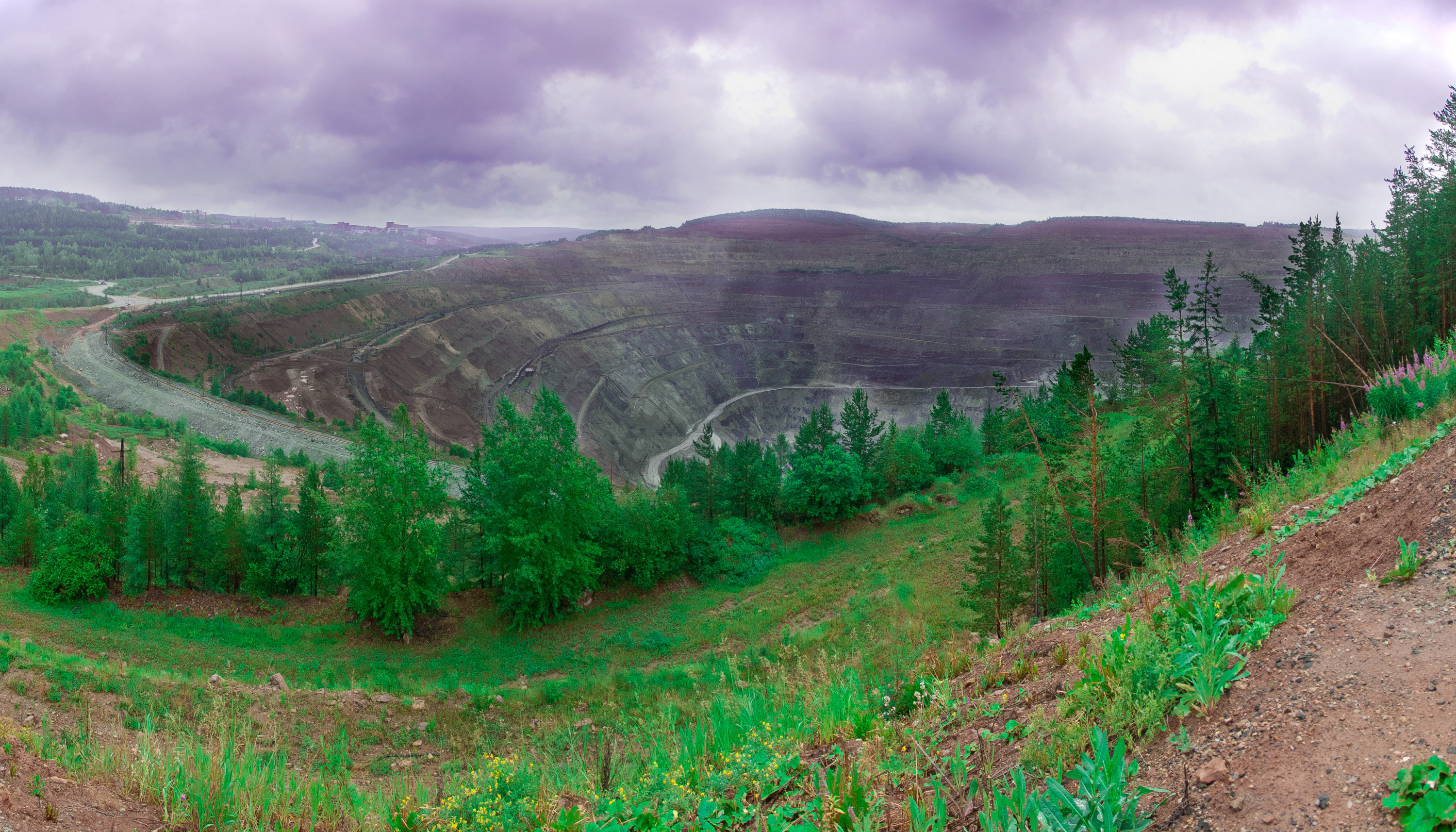 Коршуновский ГОК, карьер